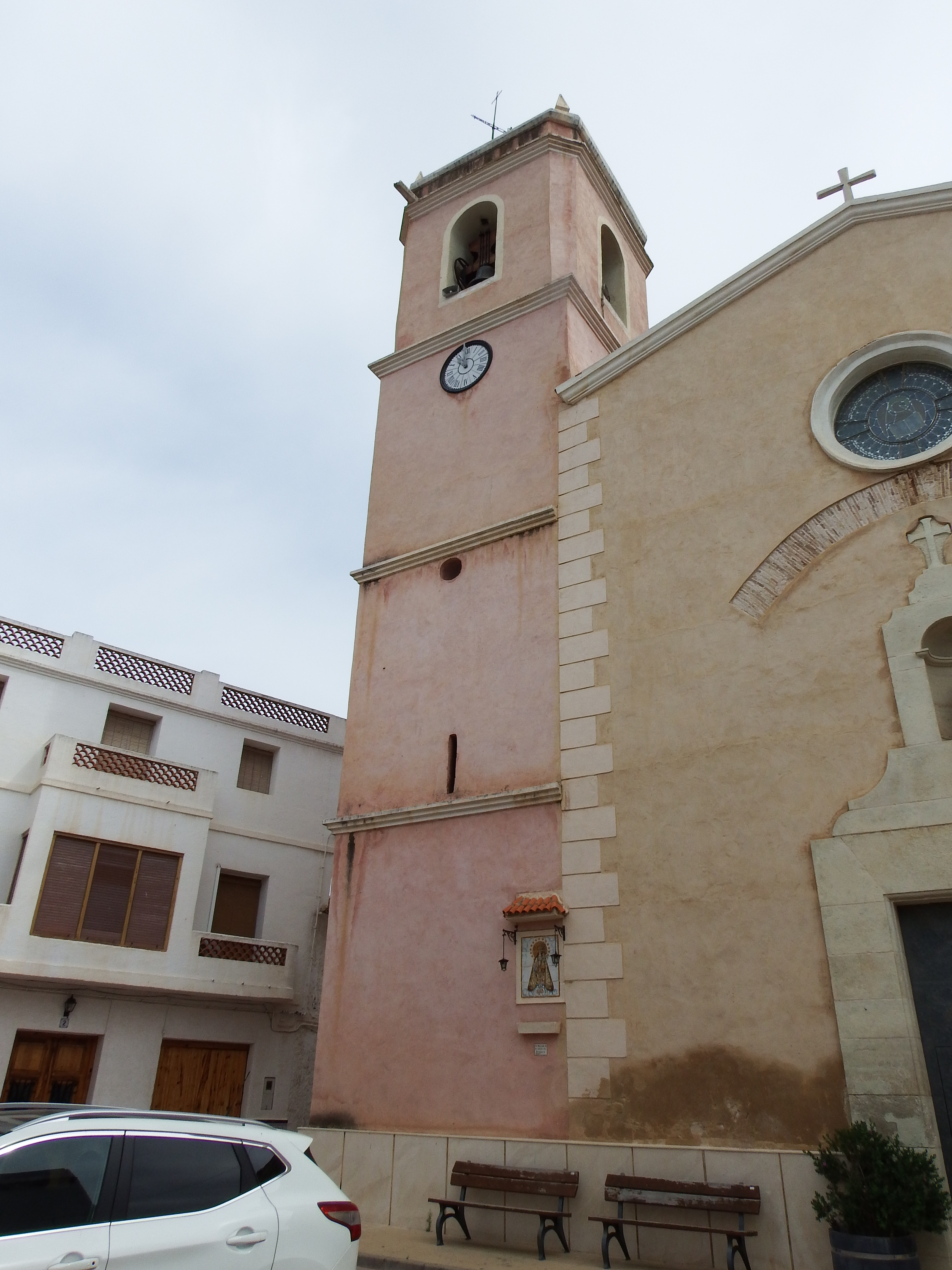 Imágenes diversas de Bicorp, La Canal de Navarrés